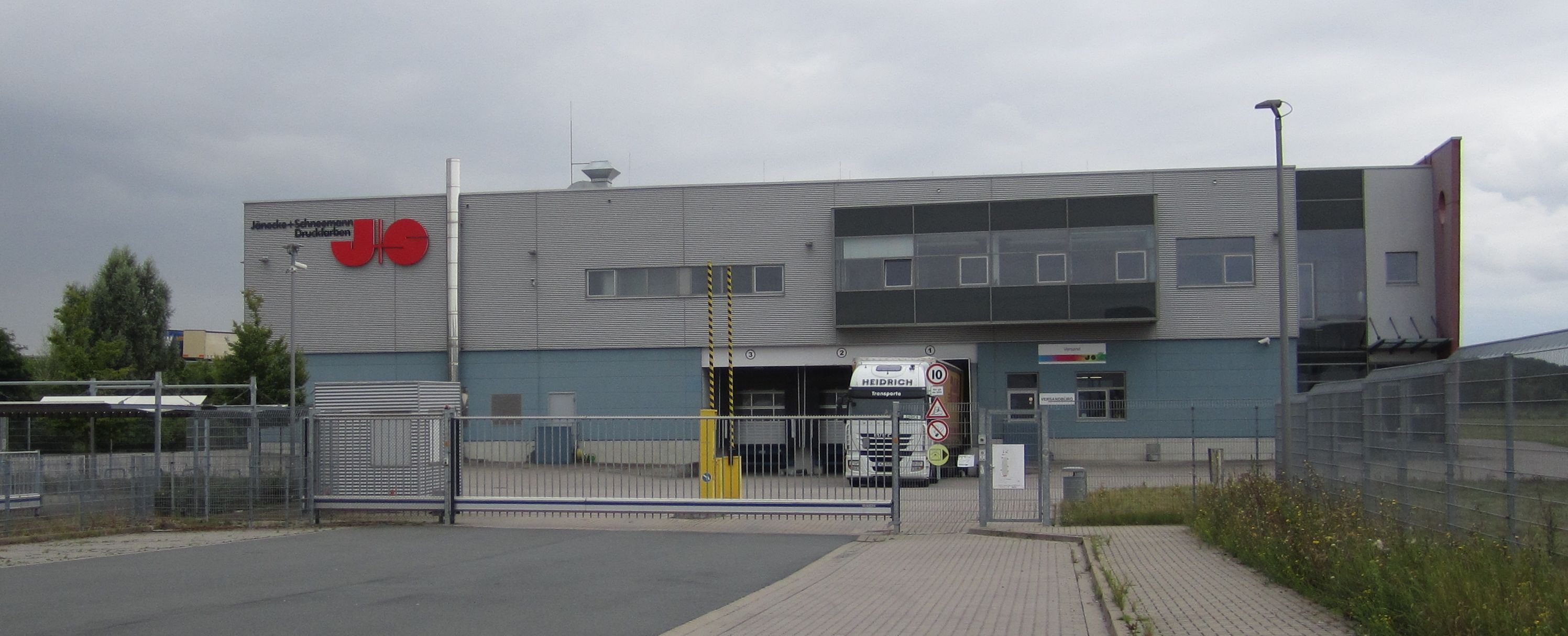 Produktionshalle des Druckfarbenherstellers Jänecke+Schneemann in Höver bei Hannover.